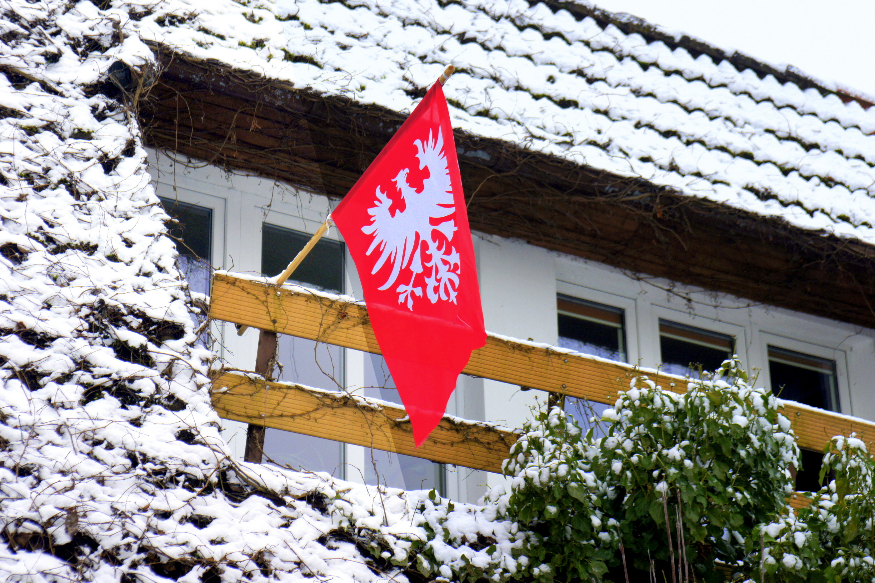 Wielkopolska - współcześnie upamiętnia się powstanie wielkopolskie poprzez wywieszenie flagi powstańczej